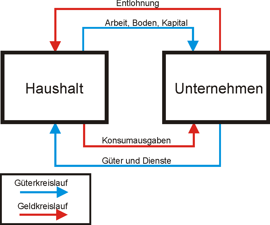 Einfacher Wirtschaftsreislauf; Selbst gezeichnet; GNU-FDL 10:06, 29. Apr 2004 RobbyBer 1024 x 852 (11622 Byte) (Schema einfacher Wirtschaftskreislauf; Selbst gezeichnet; GNU-FLD) 17:50, 15. Apr 2004 RobbyBer 823 x 685 (14090 Byte) (Einfacher Wirtschaftskreislauf; Selbst gezeichnet; GNU-FDL)